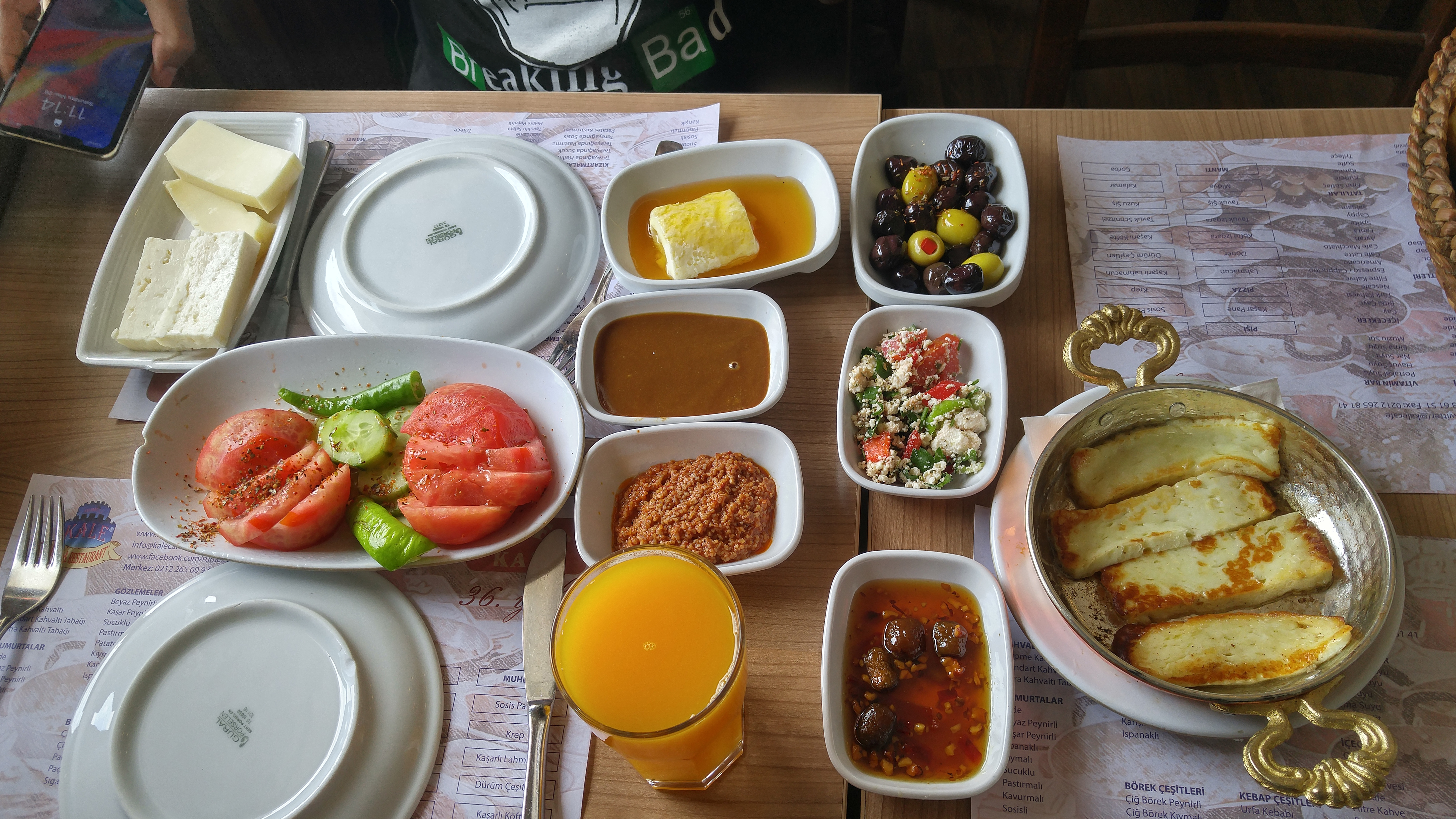 Српски (ћирилица): Истанбул кроз историју познат као Византион, Константинопољ и Цариград, најнасељенији је град у Турској Републици и привредно, културно и историјско средиште земље. Истанбул је трансконтинентални град у Евроазији, смјештен на Босфорском мореузу (који раздваја Европу и Азију) између Мраморног и Црног мора.